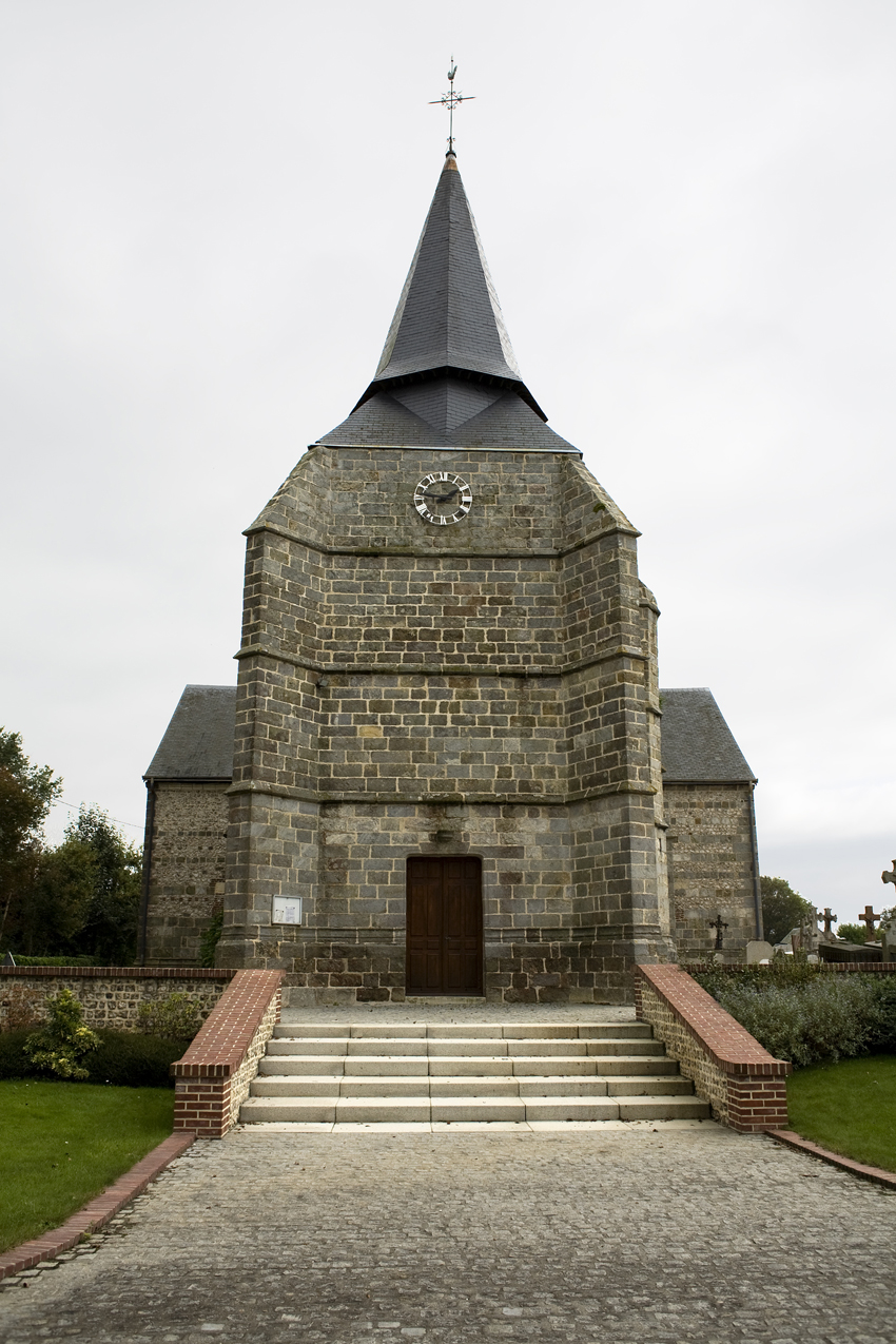 Eglise .